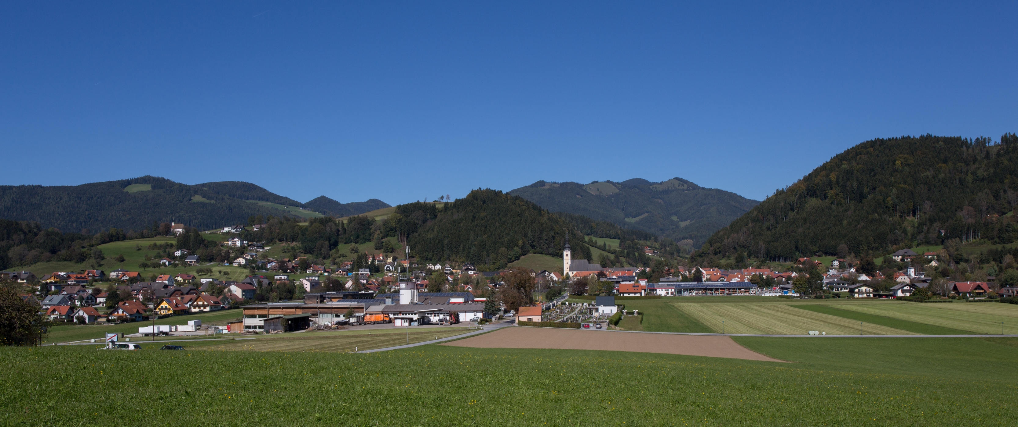 Passail in der Steiermark von Süden gesehen. Austria